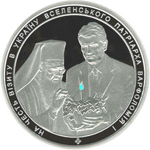 Юбилейная монета в честь визита на Украину константинопольского патриарха Варфоломея I. Изображён действующий ныне живущий президент Украины Виктор Ющенко и патриарх константинопольский Варфоломей. Реверс. Характеристики монеты Номинал: 50 гривен Тираж: 1000 шт. Материал: серебро 999 Качество: специальный анциркулейтед Диаметр: 85,00 мм. Вес: 500,00 граммов (полкило). Гурт: надпись